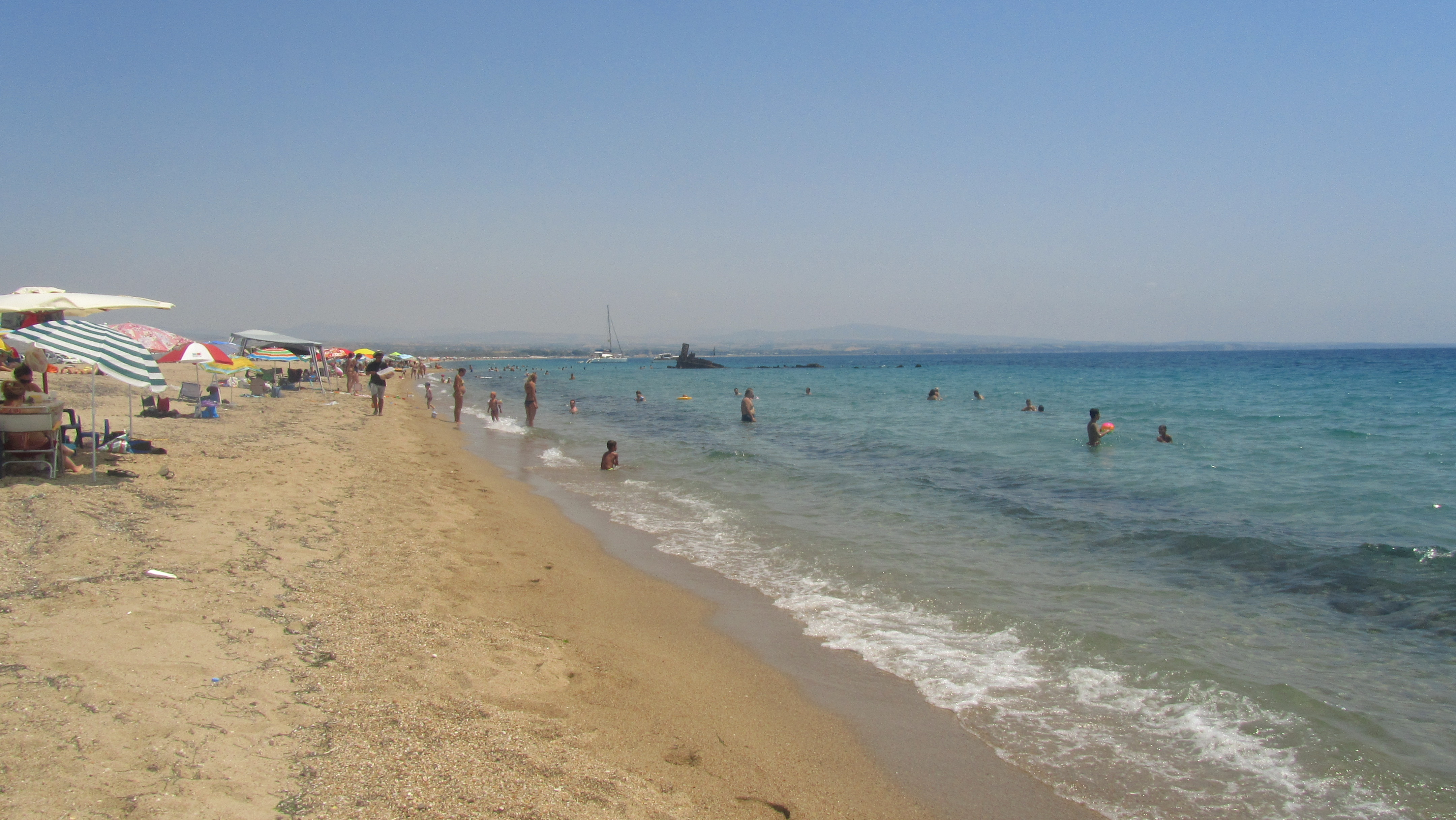 ΕΠΑΝΟΜΗ-ΦΑΝΑΡΙ-ΜΕ ΘΕΑ ΤΗΝ ΧΑΛΚΙΔΙΚΗ